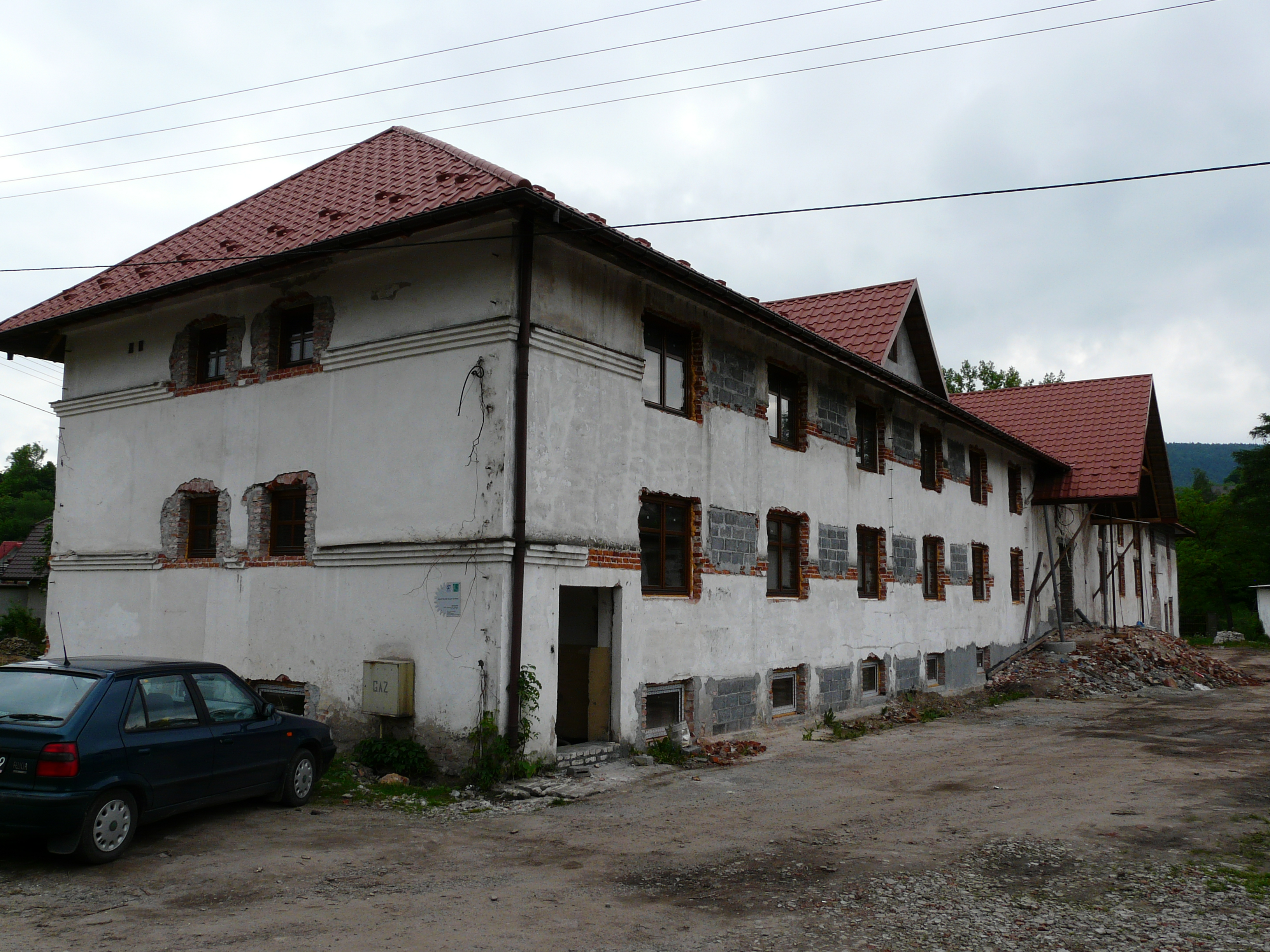 Dawna słodownia browaru klasztornego w Szczyrzycu. Budynek trakcie przebudowy na pensjonat (2008 r.).